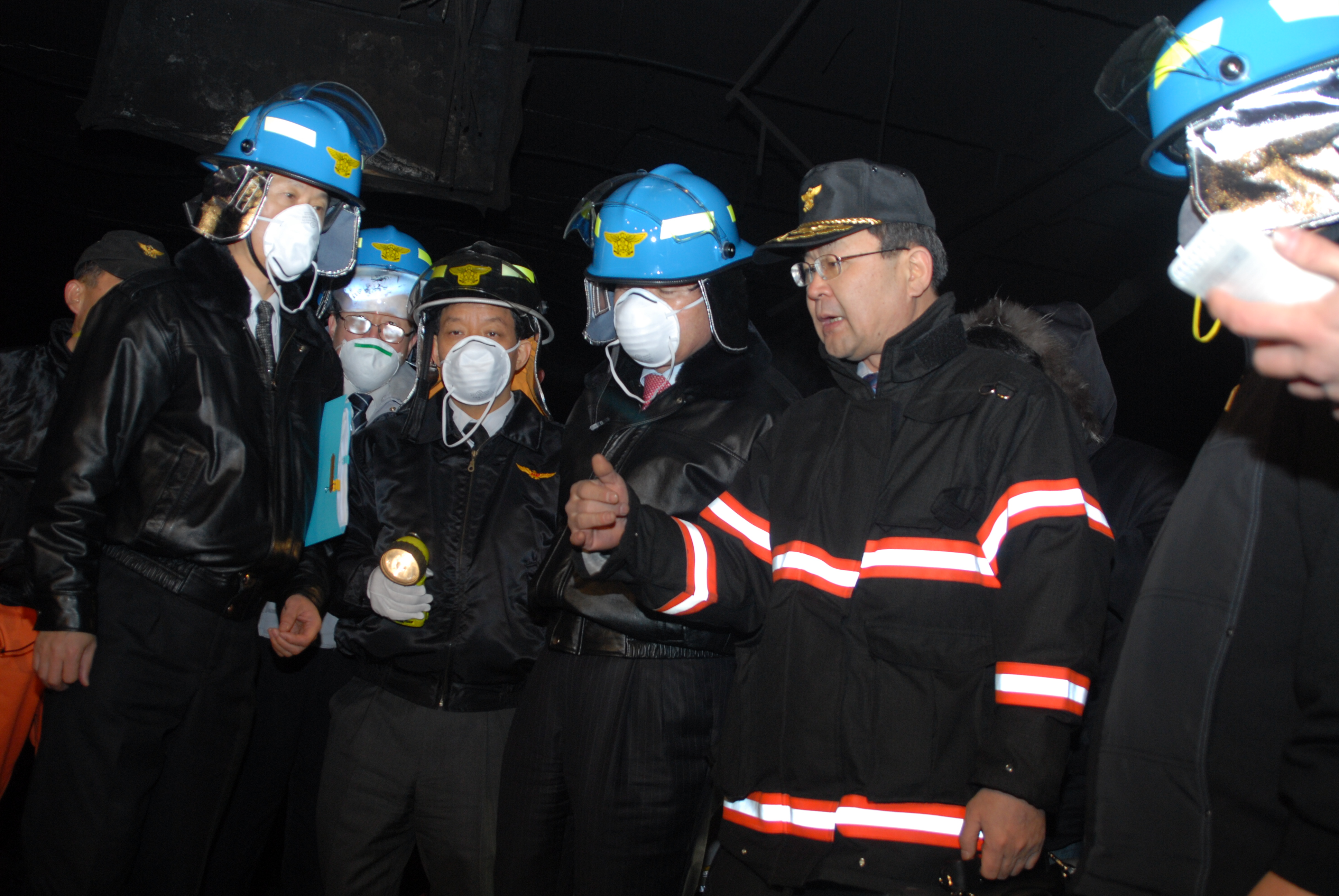 이천 냉동창고 화재 사고